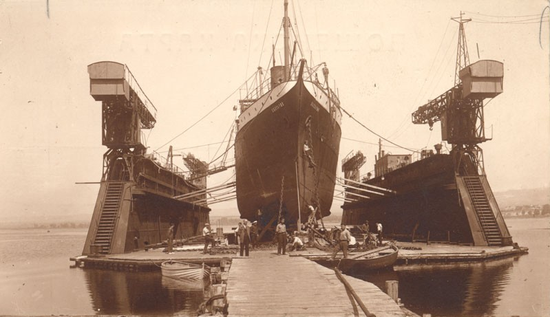 Корабът "България" в дока на Кораловаг АД.